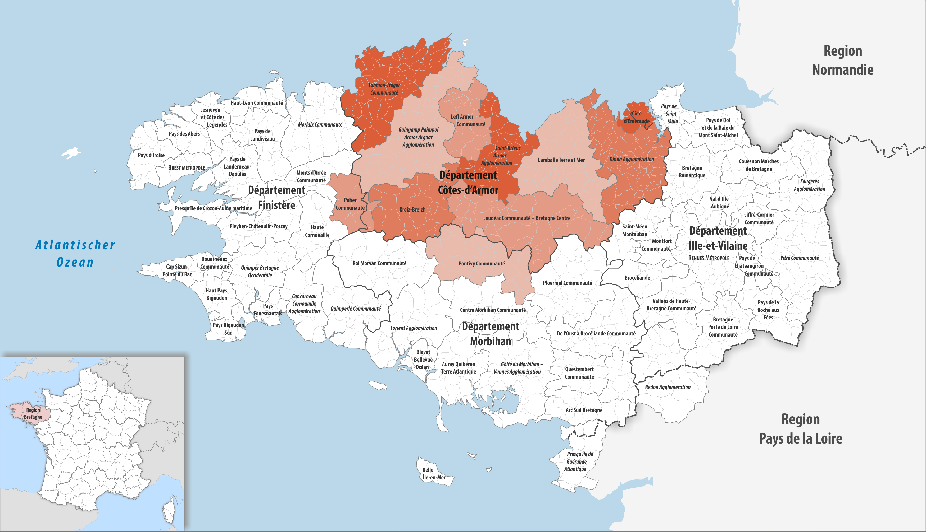 Gemeindeverbände im Département Côtes-d’Armor